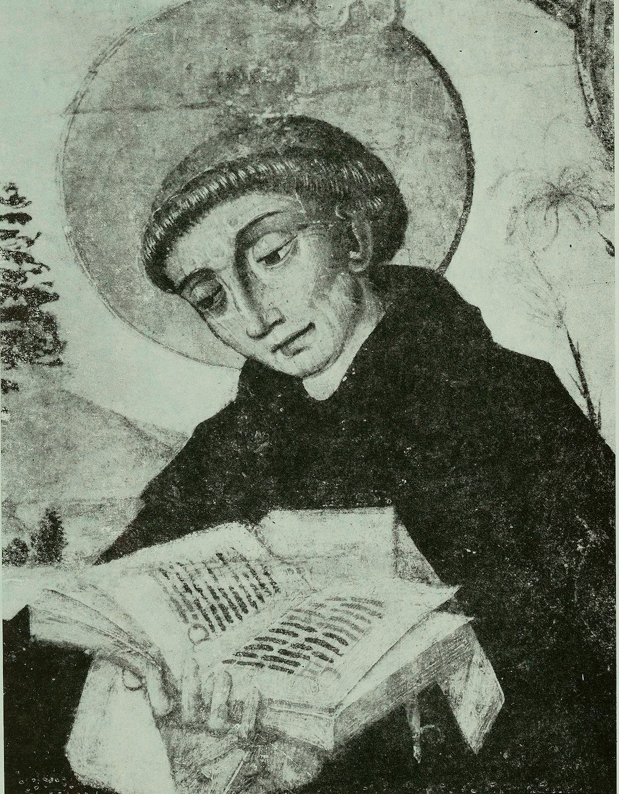 Święty Dominik (fragment "Zwiastowania z Jodłownika"), Mistrz Zwiastowania z Jodłownika (fot. W. Gomuła)